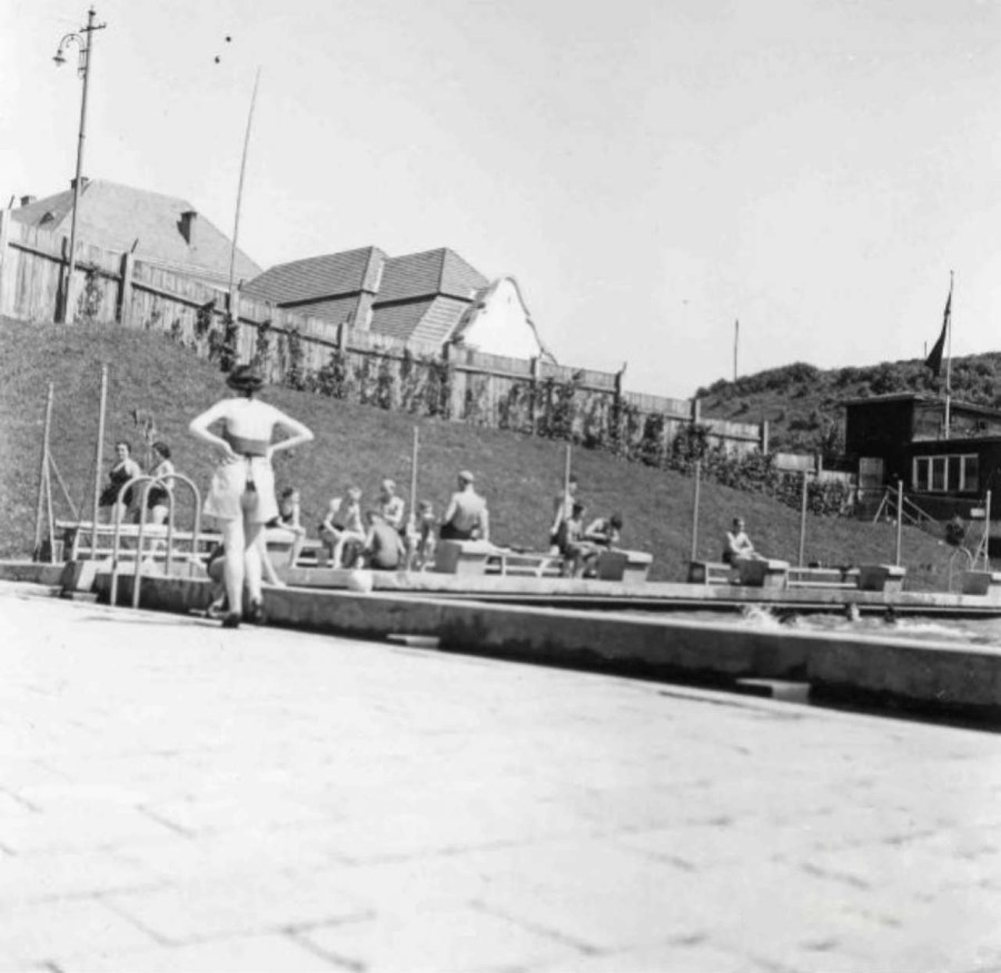 На "Залізних водах" у Львові. Фото до 1939 року